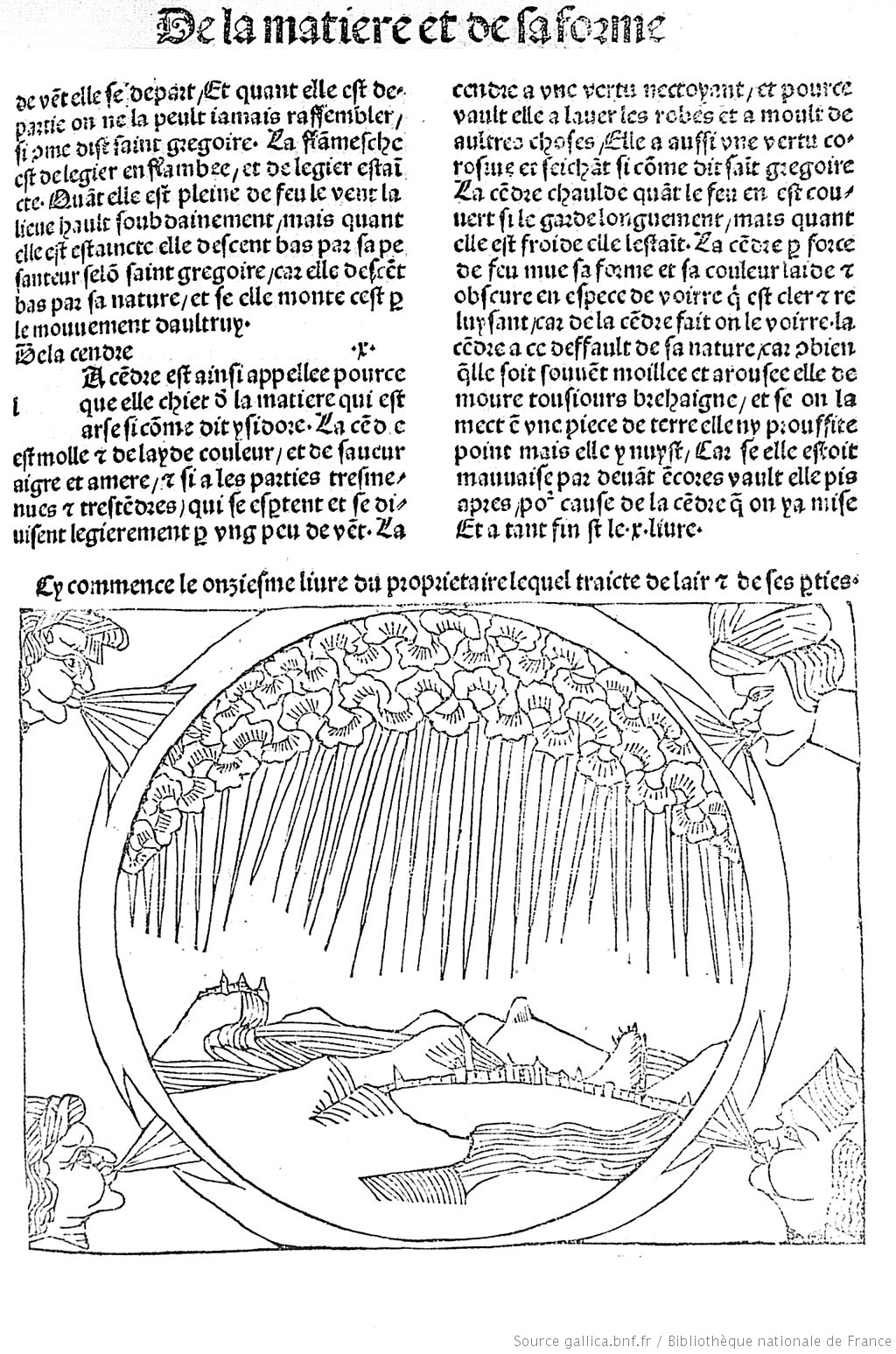 Illustrations de Le Propriétaire des choses, figure à la fin du Livre x illustrant le Livre x. De l'air. : les quatre vents soufflant sur la terre. Auteur du texte : Barthélemy de Glanville (12..-1272). Manuscrit : 1482